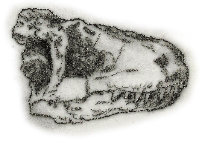 Illustration of a fossil of Lukousaurus